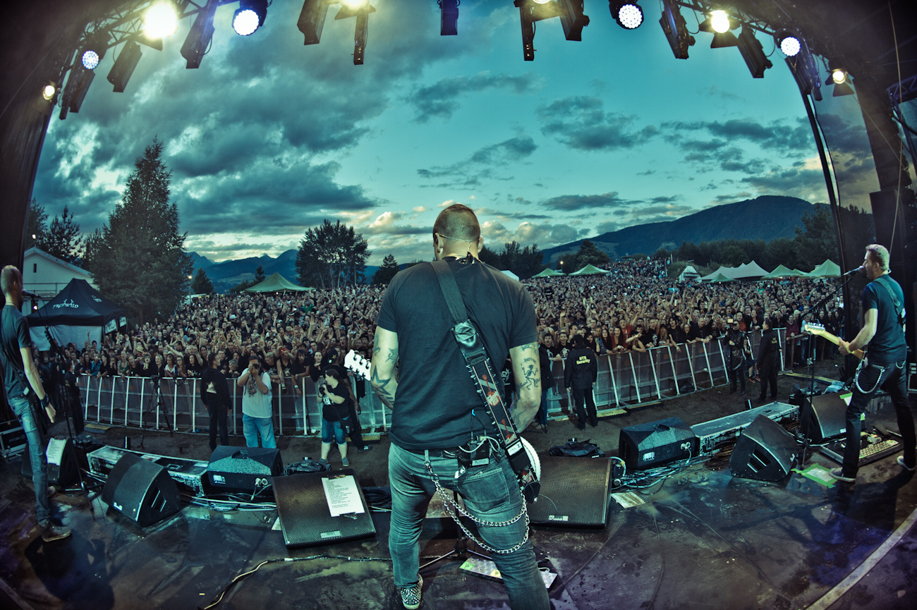 Die Band Frei.Wild bei ihrem Liveauftritt auf dem Festival Alpen Flair 2012 in Natz-Schabs in Südtirol (Italien).